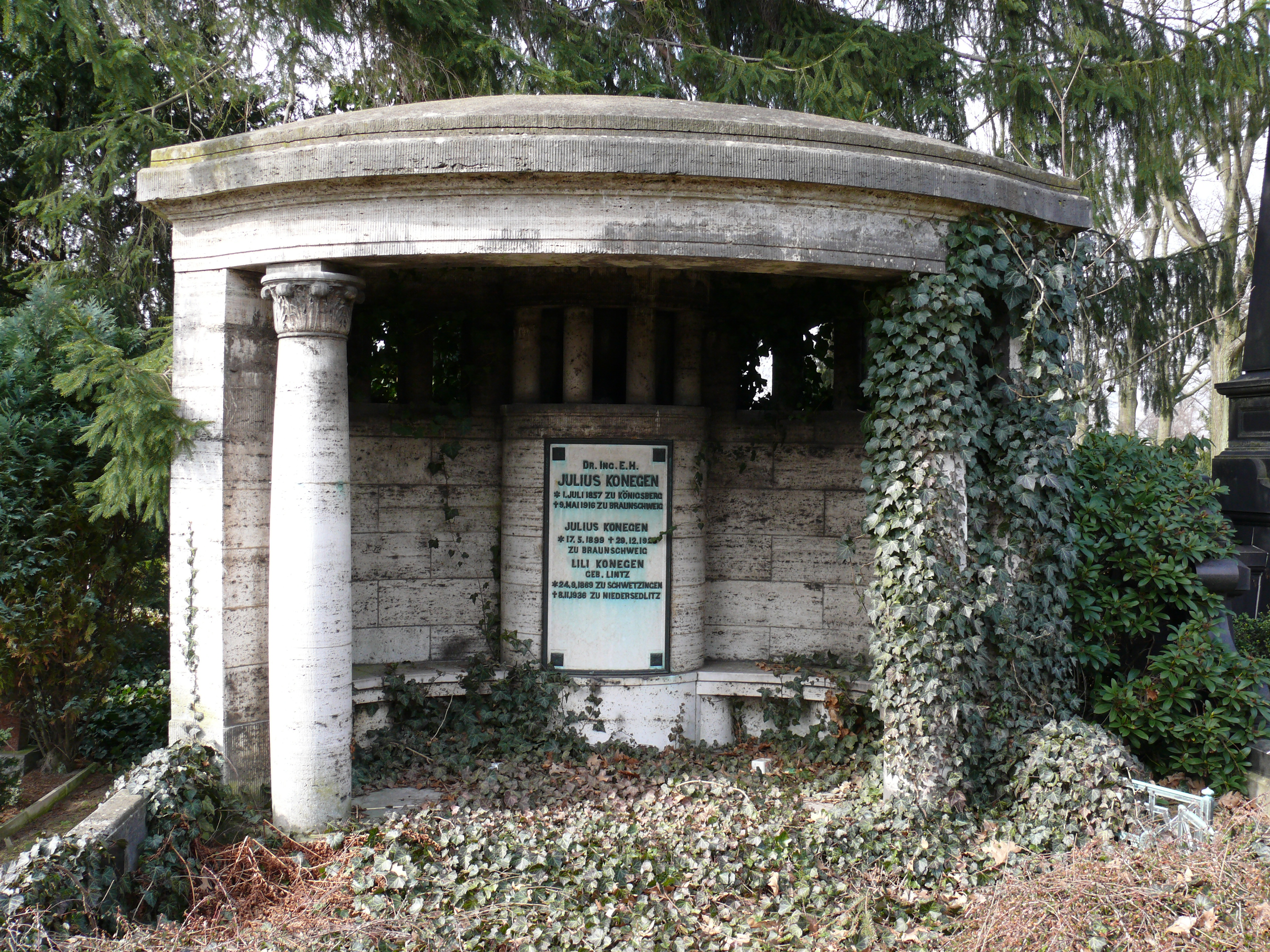 Grabstätte Julius Konegens auf dem Hauptfriedhof Braunschweig